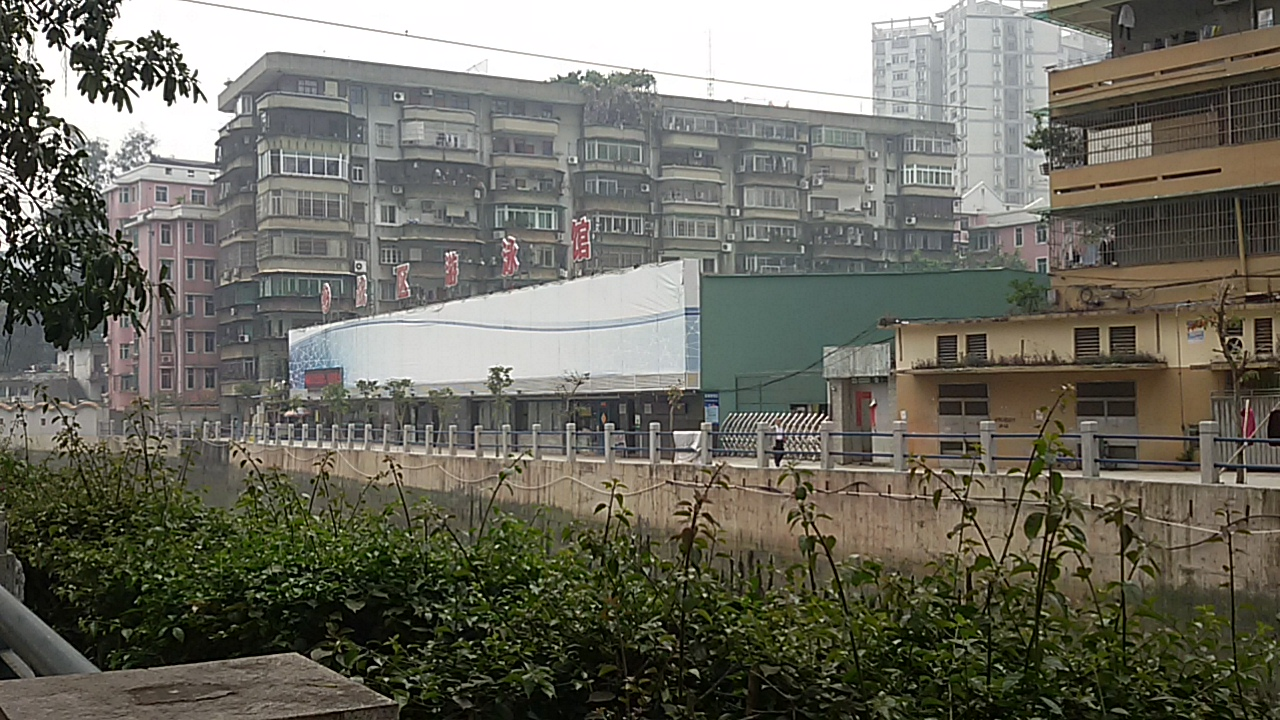 粵語: 戰區游泳館嘅主體建築